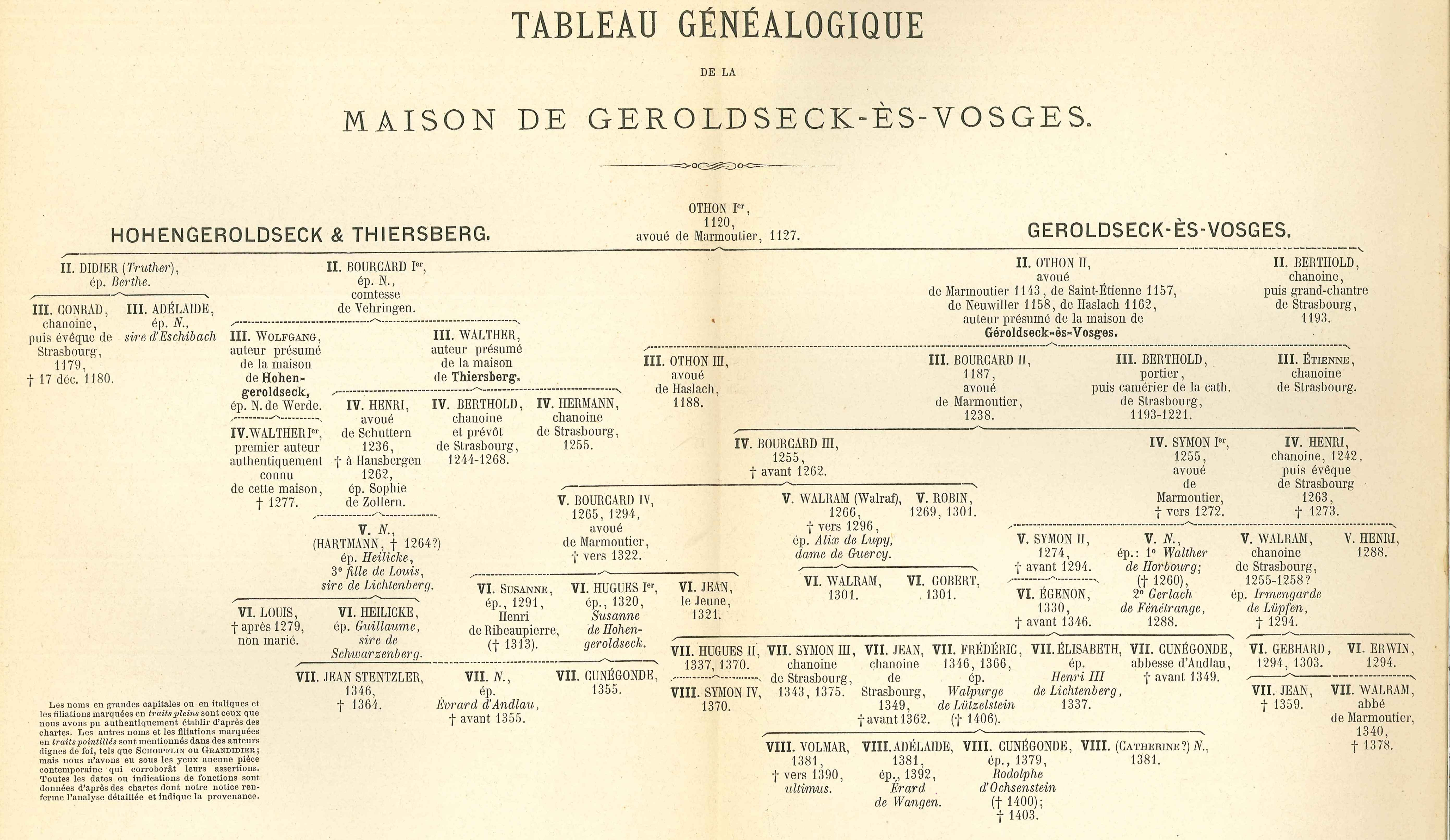 généalogie de la famille Geroldseck. Scan réalisé par la Médiathèque protestante de Strasbourg